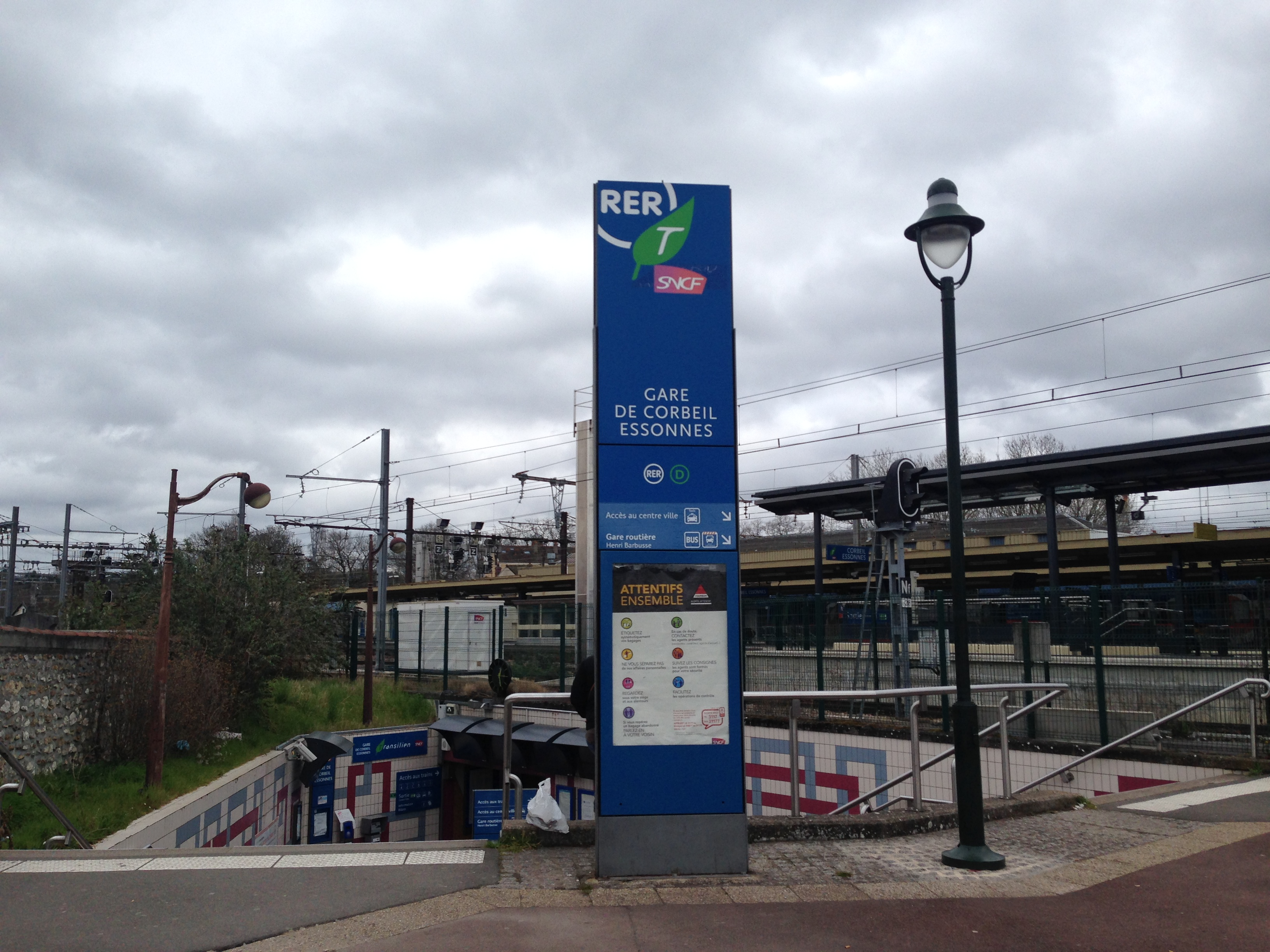 Gare de Corbeil-Essonnes en Mars 2016